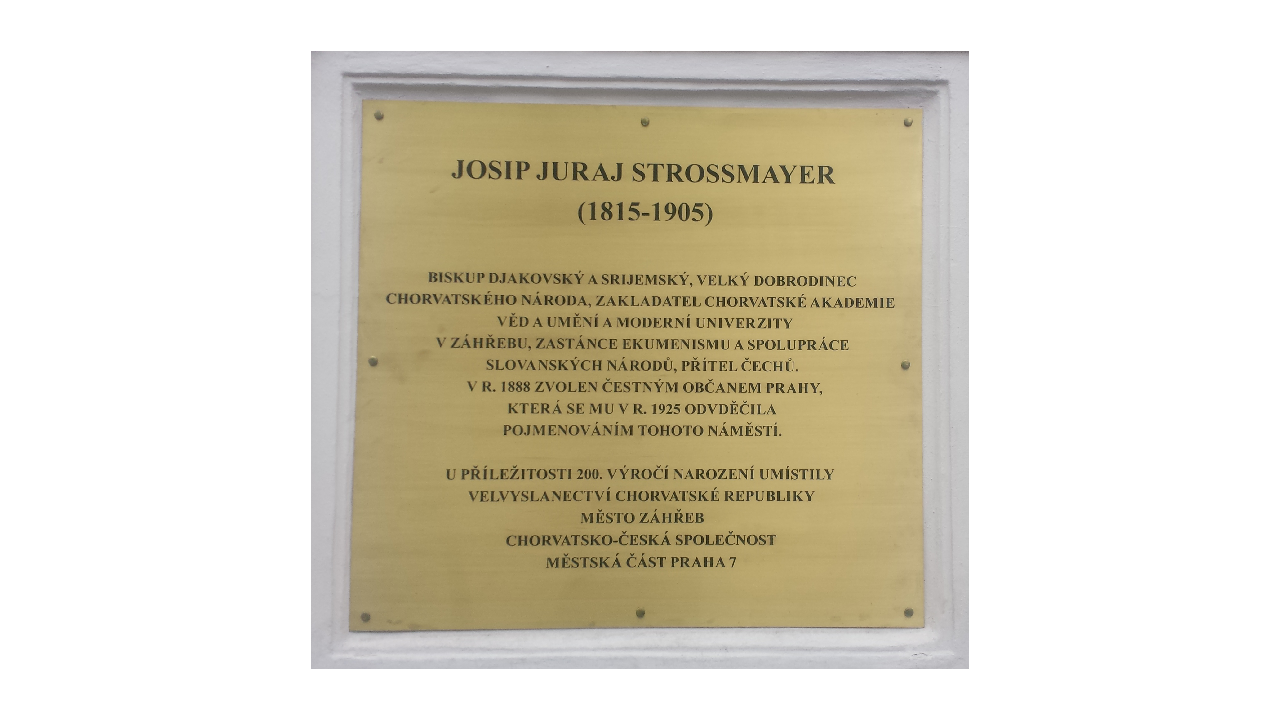 Pamětní deska Josipa Juraje Strossmayera na Strossmayerově náměstí